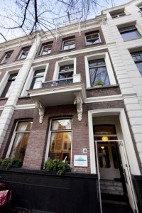 Vooraanzicht van het pand waarin De Waterheuvel huist; Sarphatistraat 43, Amsterdam